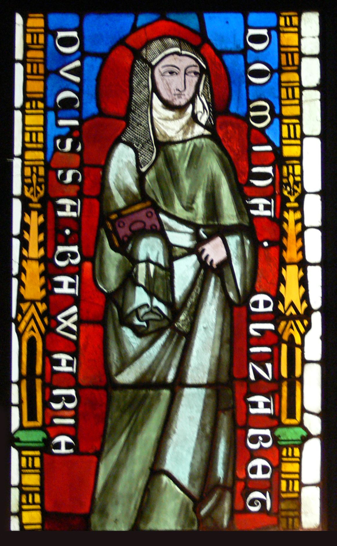 München, Bayerisches Nationalmuseum: Eine von zehn Glasscheiben aus Kloster Seligenthal bei Landshut, 1. Viertel 14. Jahrhundert, Inv. Nr. G. 914-923, erworben 1860."Domina Elisabeth ducissa bawariae" (= Elisabeth † 1314, Tochter Herzog Heinrichs XIII. von Niederbayern, in Zisterzienserinnentracht)